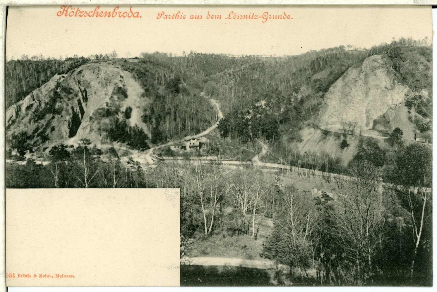 Kötzschenbroda; Lößnitzgrund This postcard is from publisher Brück & Sohn in Meißen ( postcard has a unique number 00964 and is available in a higher resolution at the publisher. This images was uploaded in a cooperation project between Wikipedians and the publisher.